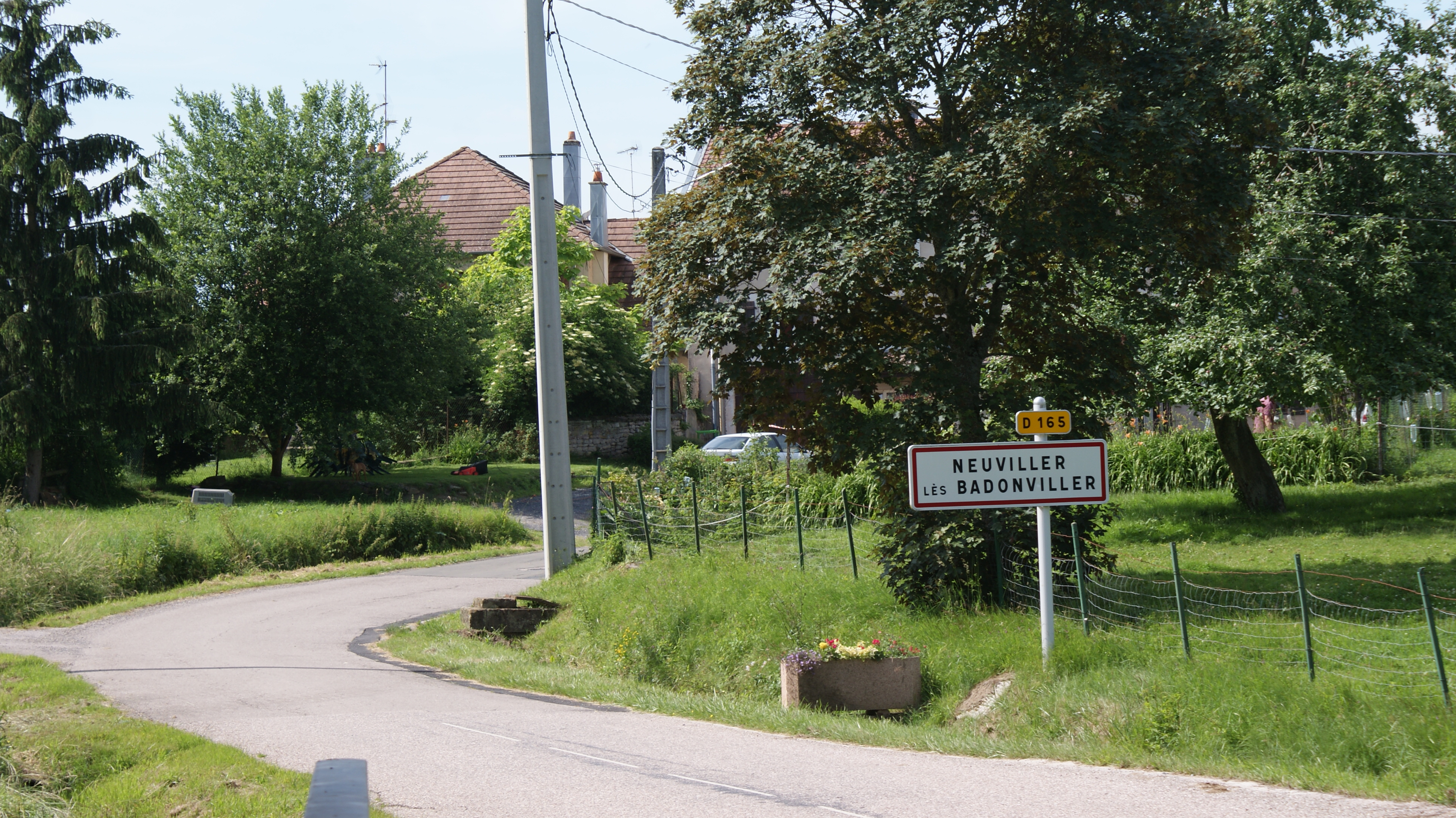 Entrée du village